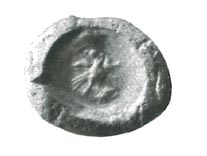 Srpskohrvatski / српскохрватски: Ban bosanski Matija Ninoslav 1240.